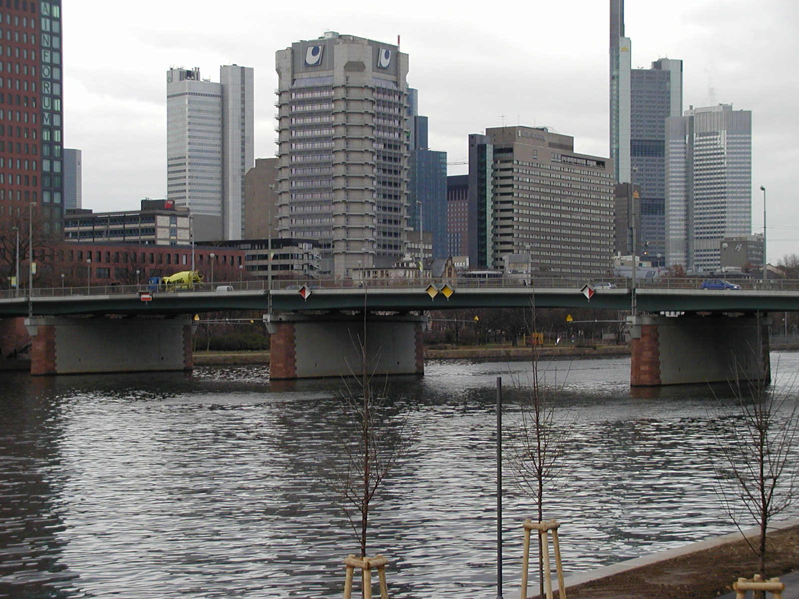 Verkehrschilder für die Binnenschifffahrt an einer Frankfurter Mainbrücke